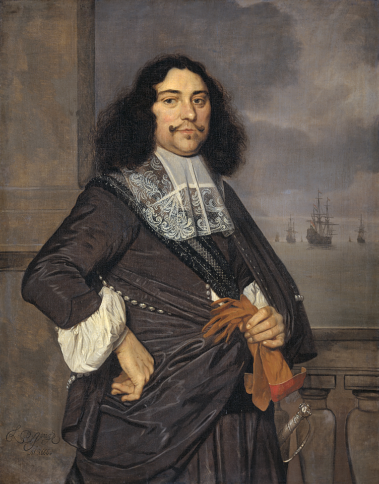 Pendant of File:Aletta van Ravensberg 1668.jpg